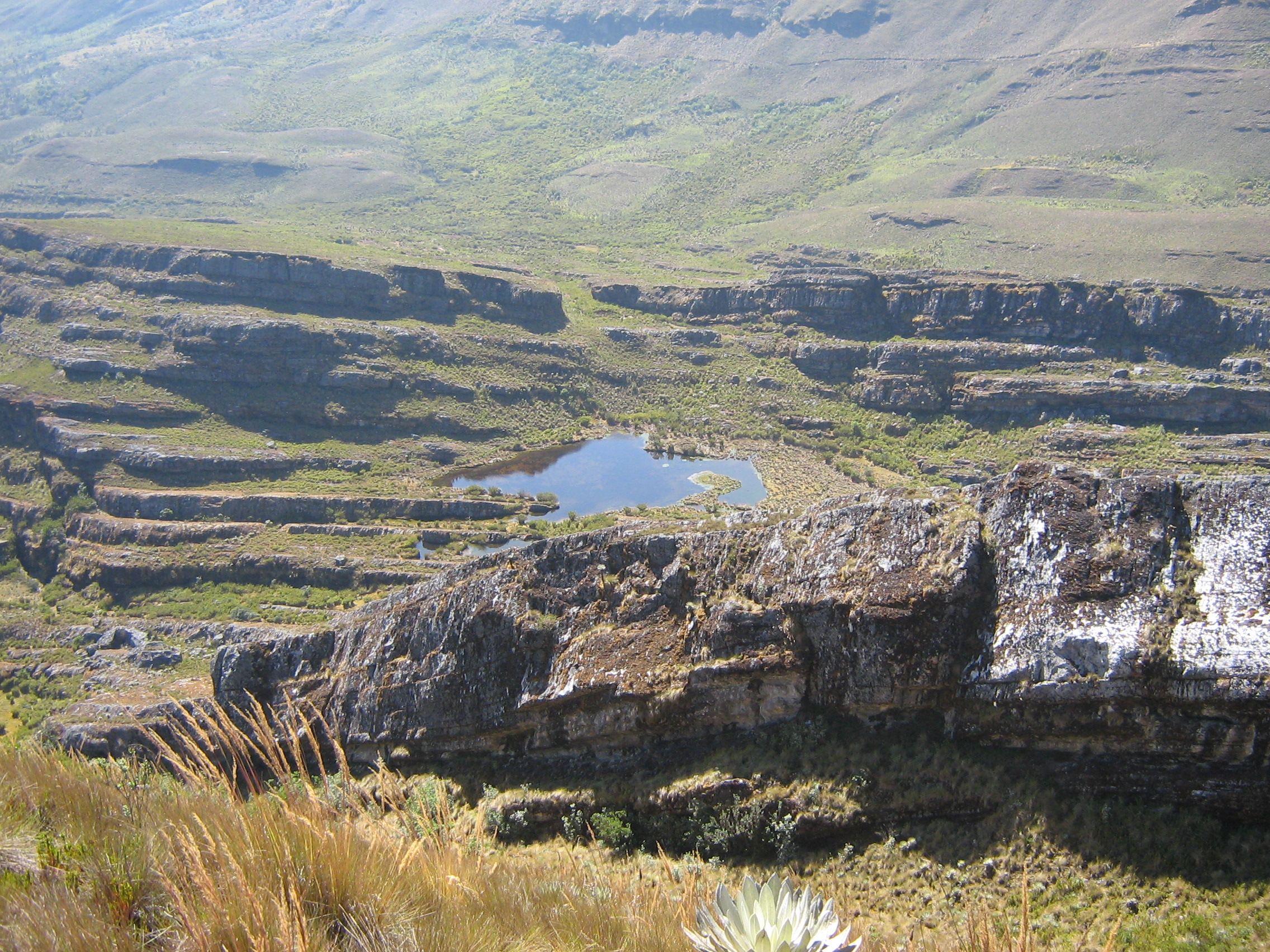 Esta laguna pertenece alparque nacionalpraramo de pisba en boyaca colombia